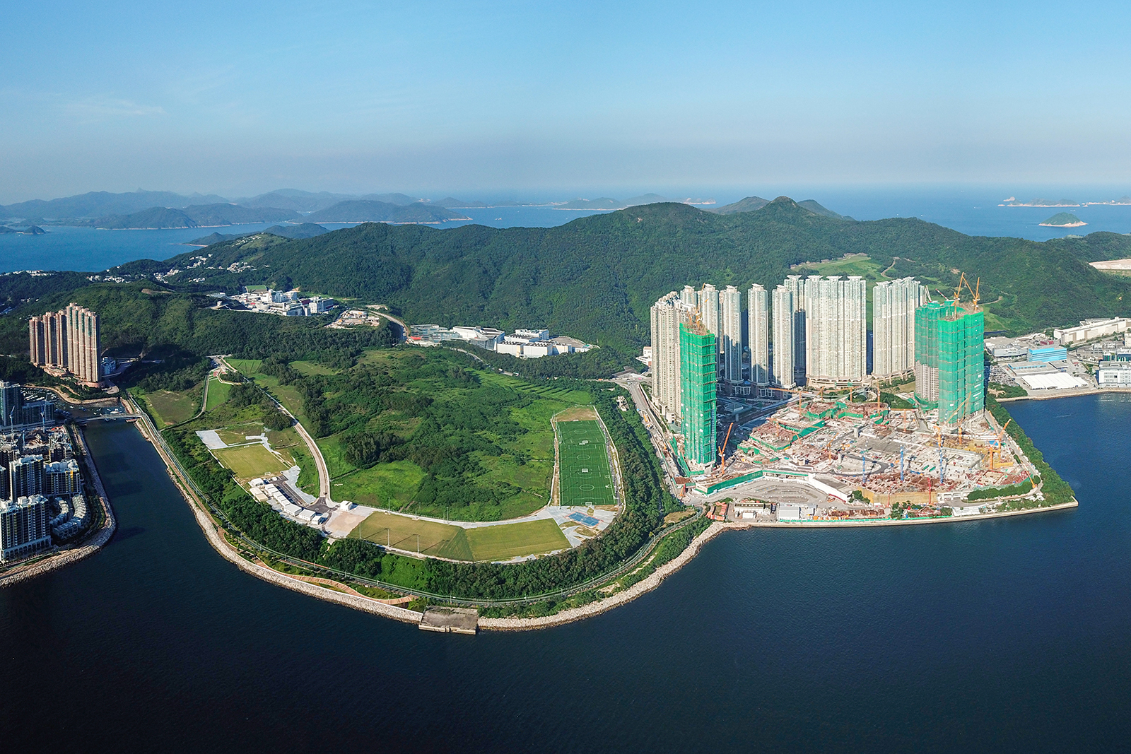 Pak Shing Kok